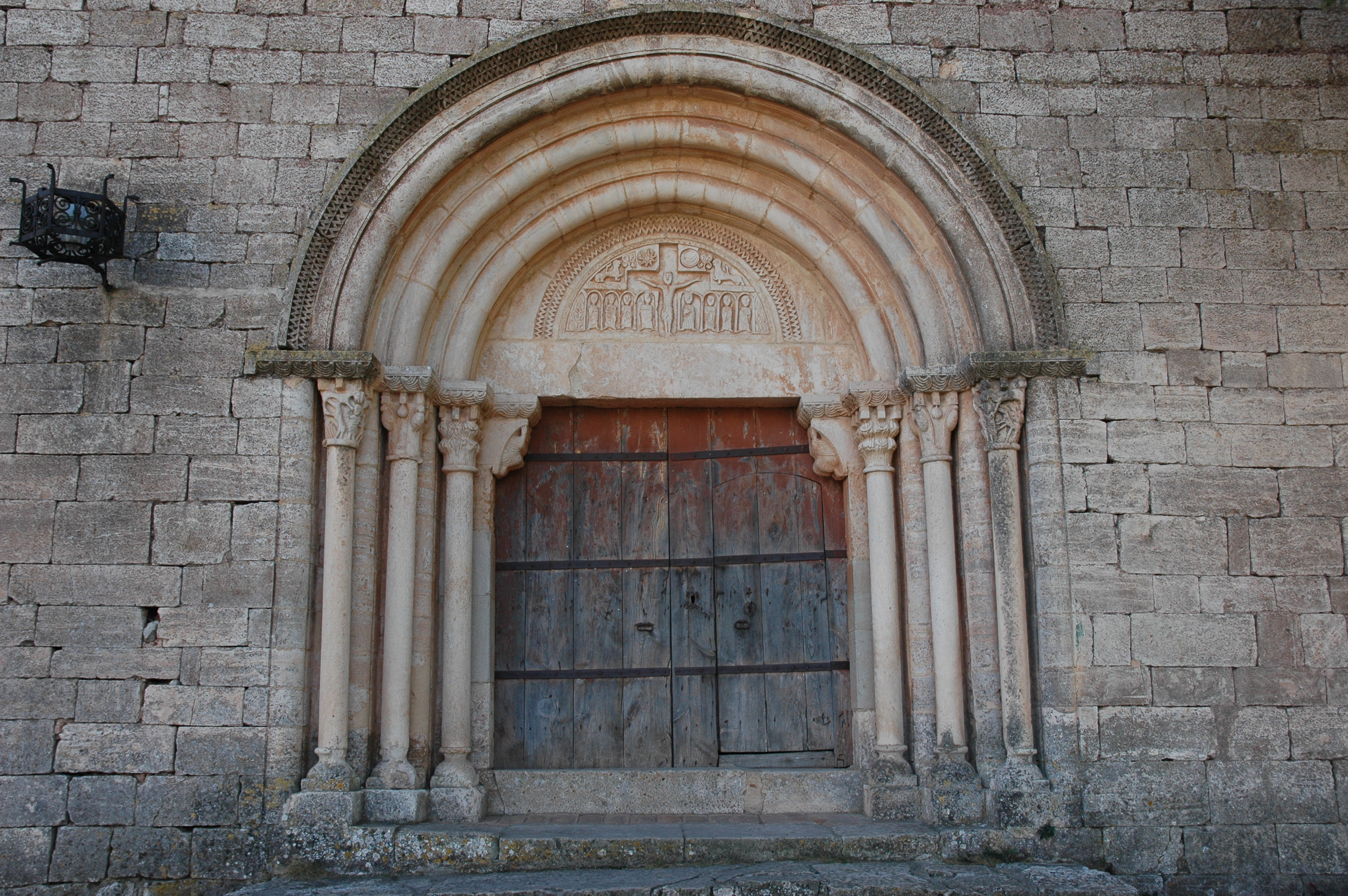 Siurana - Església de Santa Maria